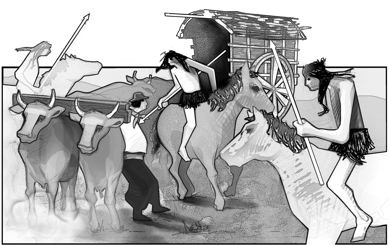 Dibujo demostrativo de encuentros entre carreros y arrieros, por el camino que de la zona del Cululú iba hacia el norte, en la primera invasión guaykukú.